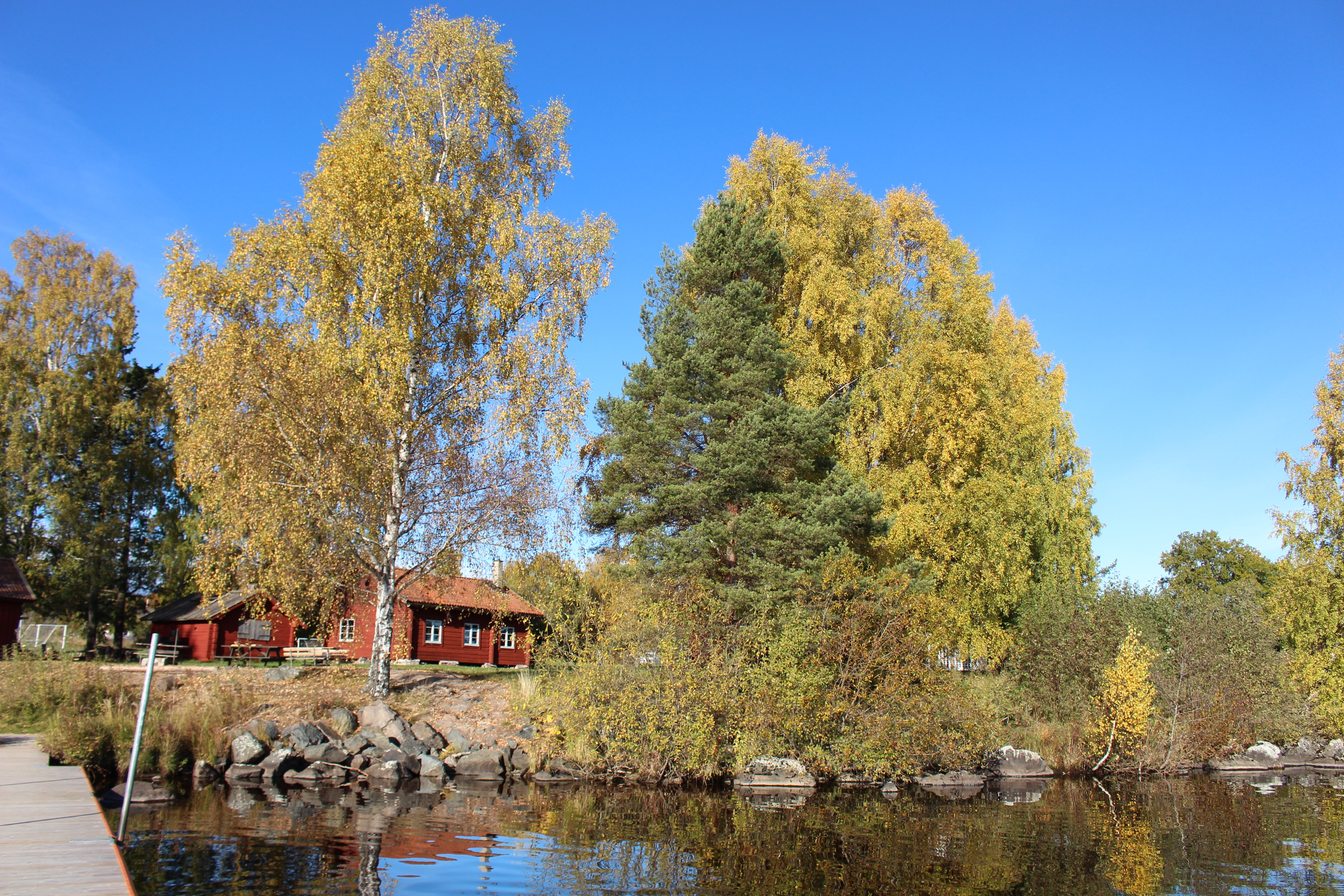 Sjöstugan 2.0 vid Bäringens strand. Musiklinjens Pop & Rockinriktnings hemklassrum